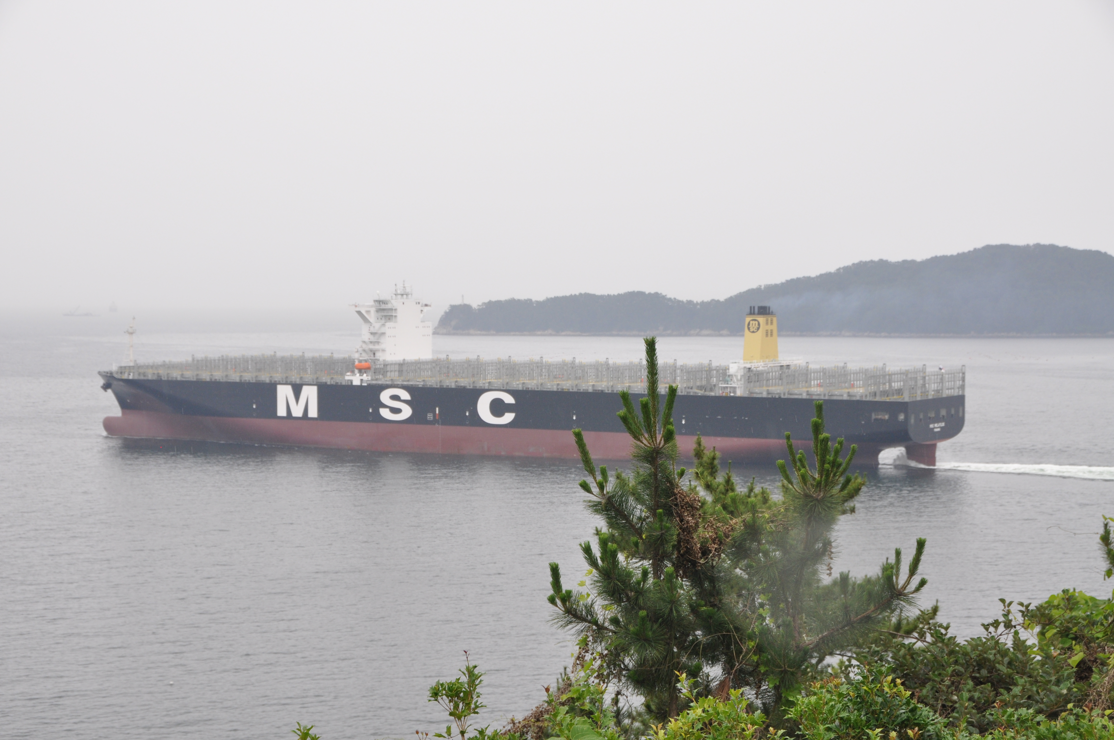 옥포해전이 벌어졌던 옥포만